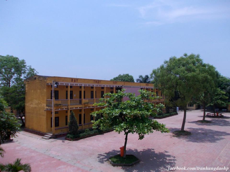 Một góc sân trường THPT Trần Hưng Đạo, Hải Phòng mùa hè